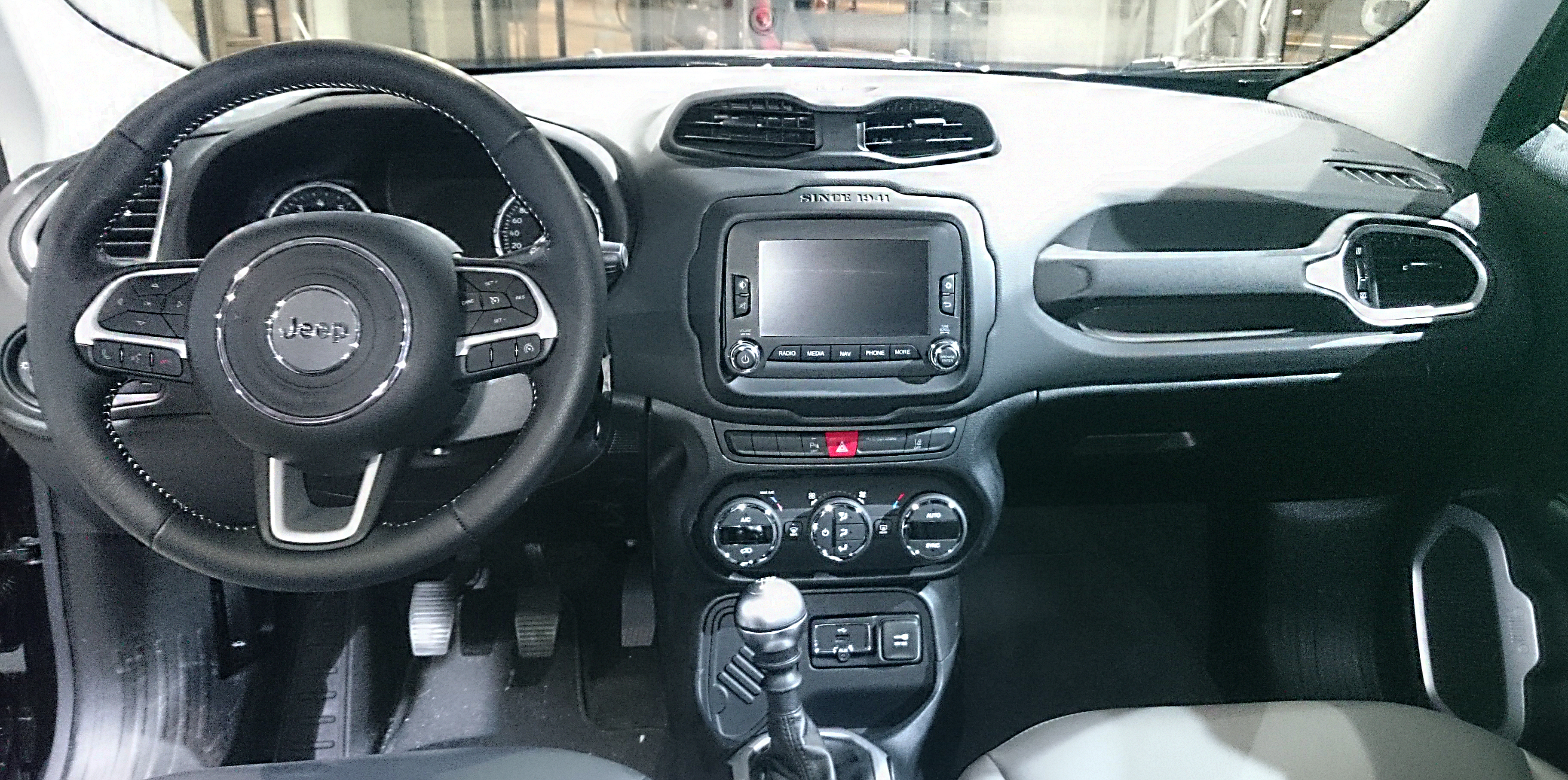 Showroom Jeep in Piazza Gae Aulenti (Milano)